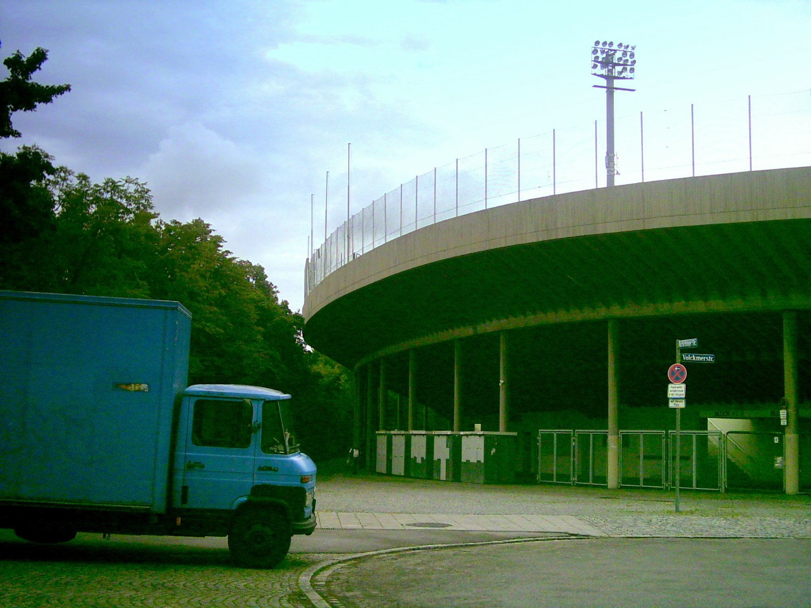 Grünwalder Stadion, München Untergiesing-Harlaching, Westkurve